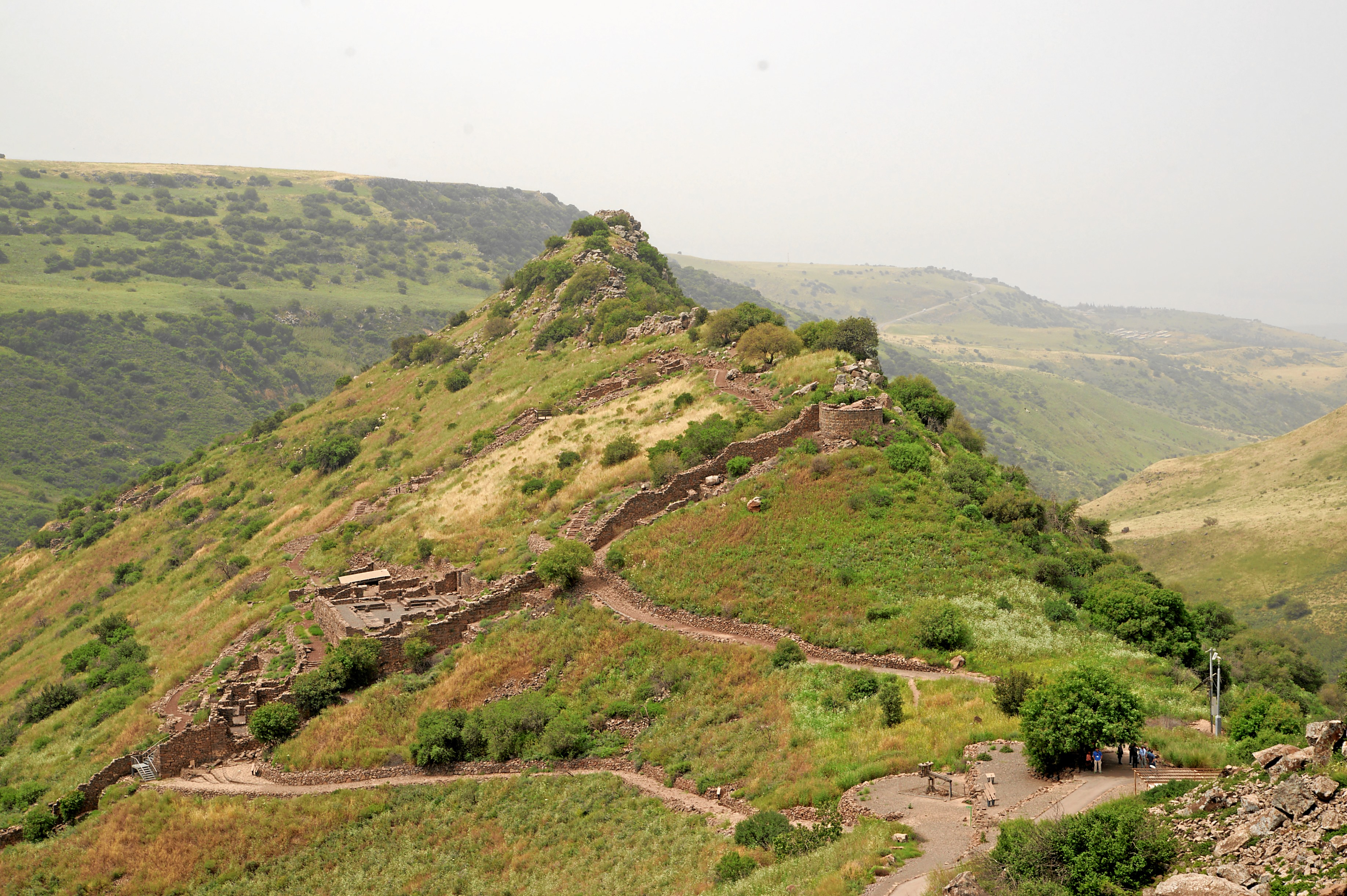 Gamla - antike Stadt